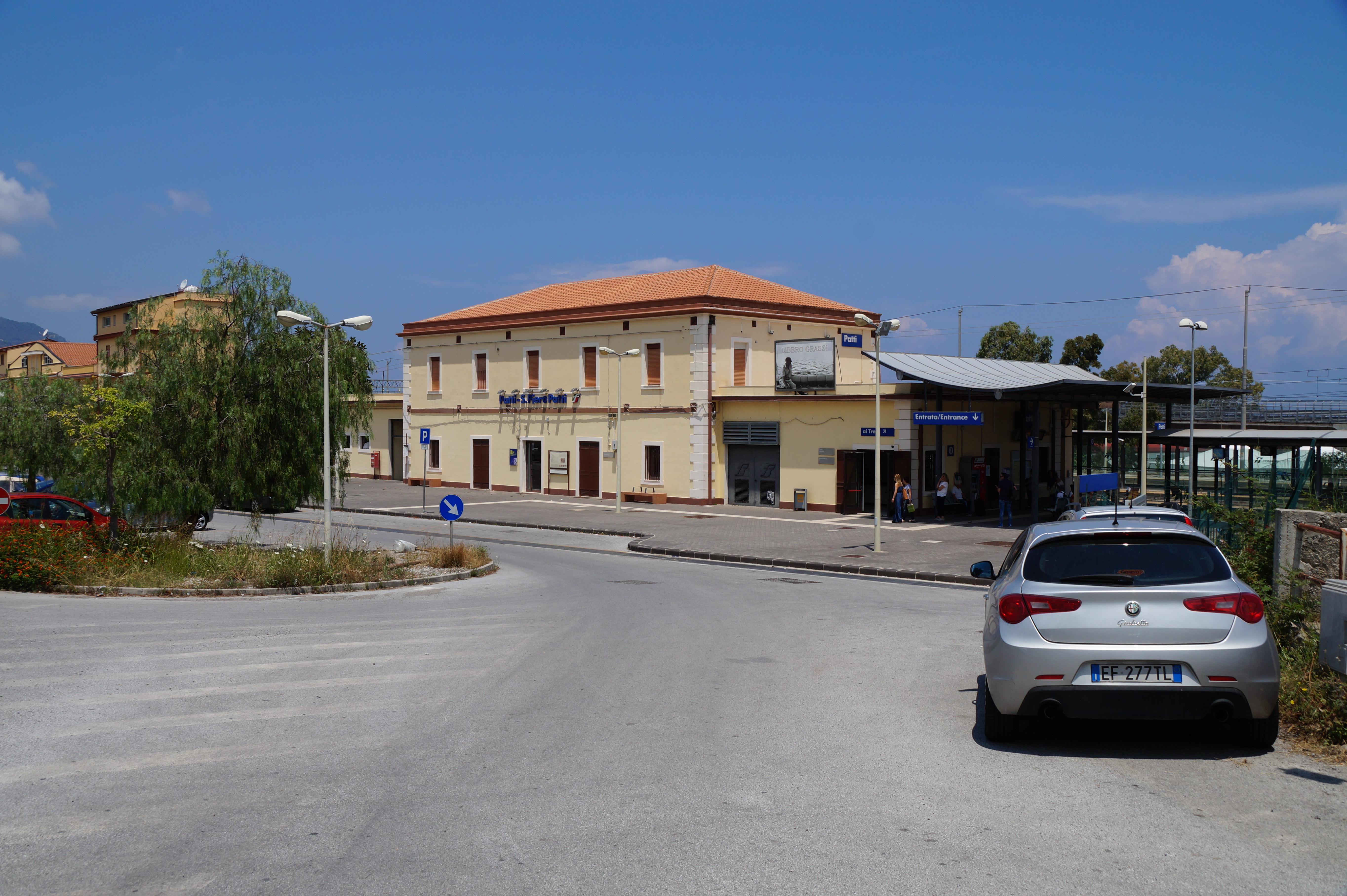 Bahnhofsgebäude Bahnhof Patti-S.Piero Patti